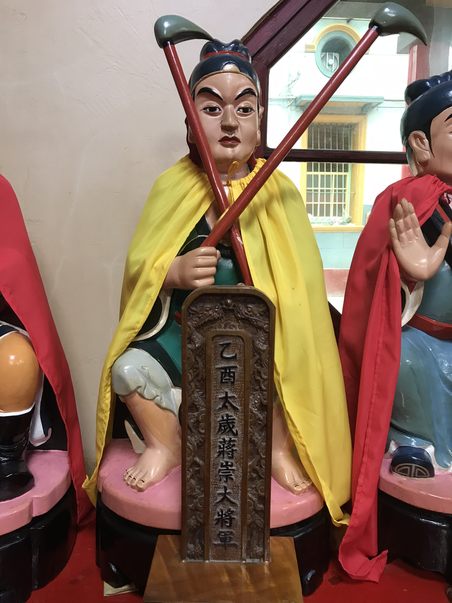 府乙酉太歲蔣崇大將軍神像